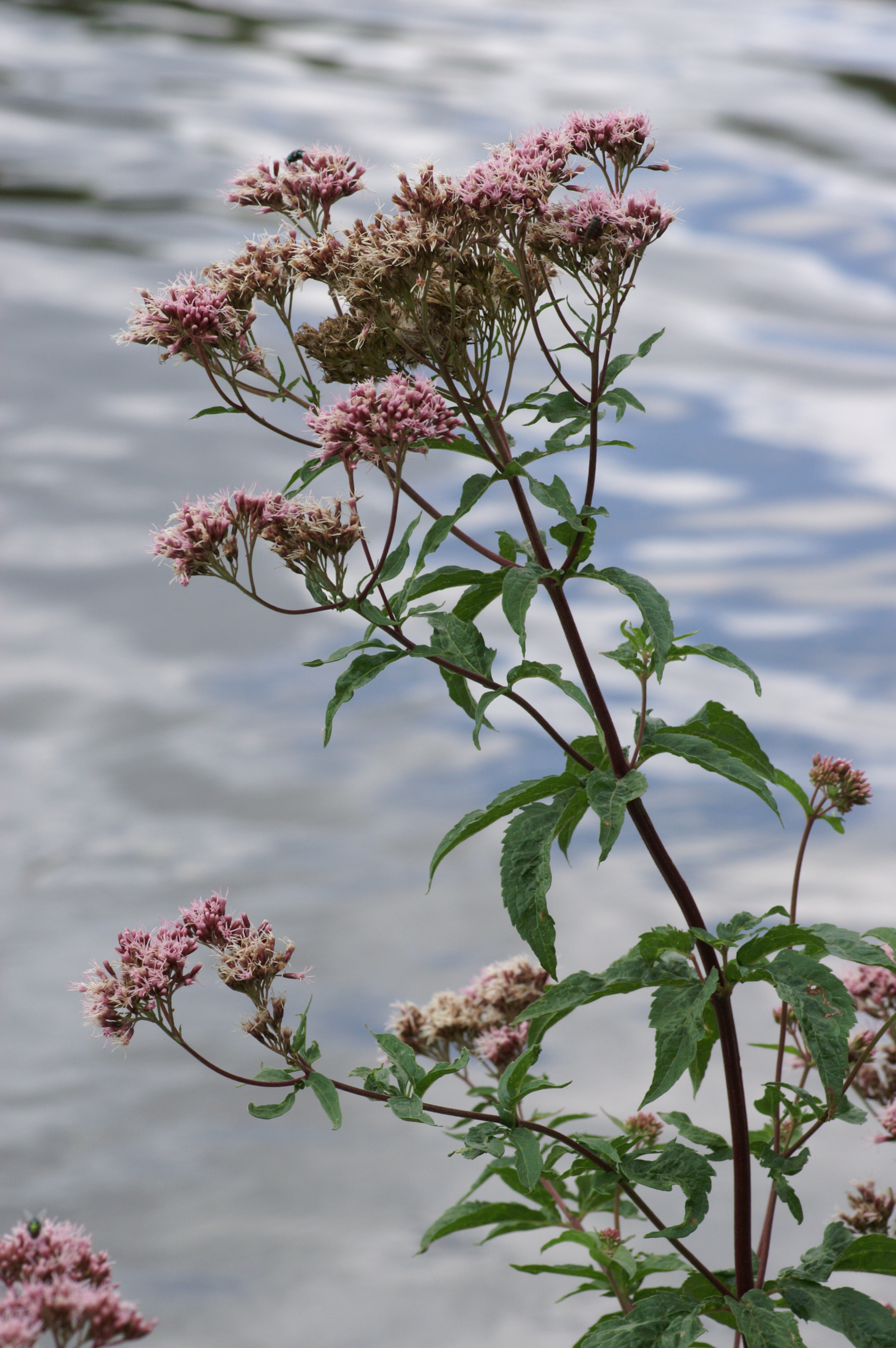 Gewöhnlicher Wasserdost, Pflanze (Eupatorium cannabinum)